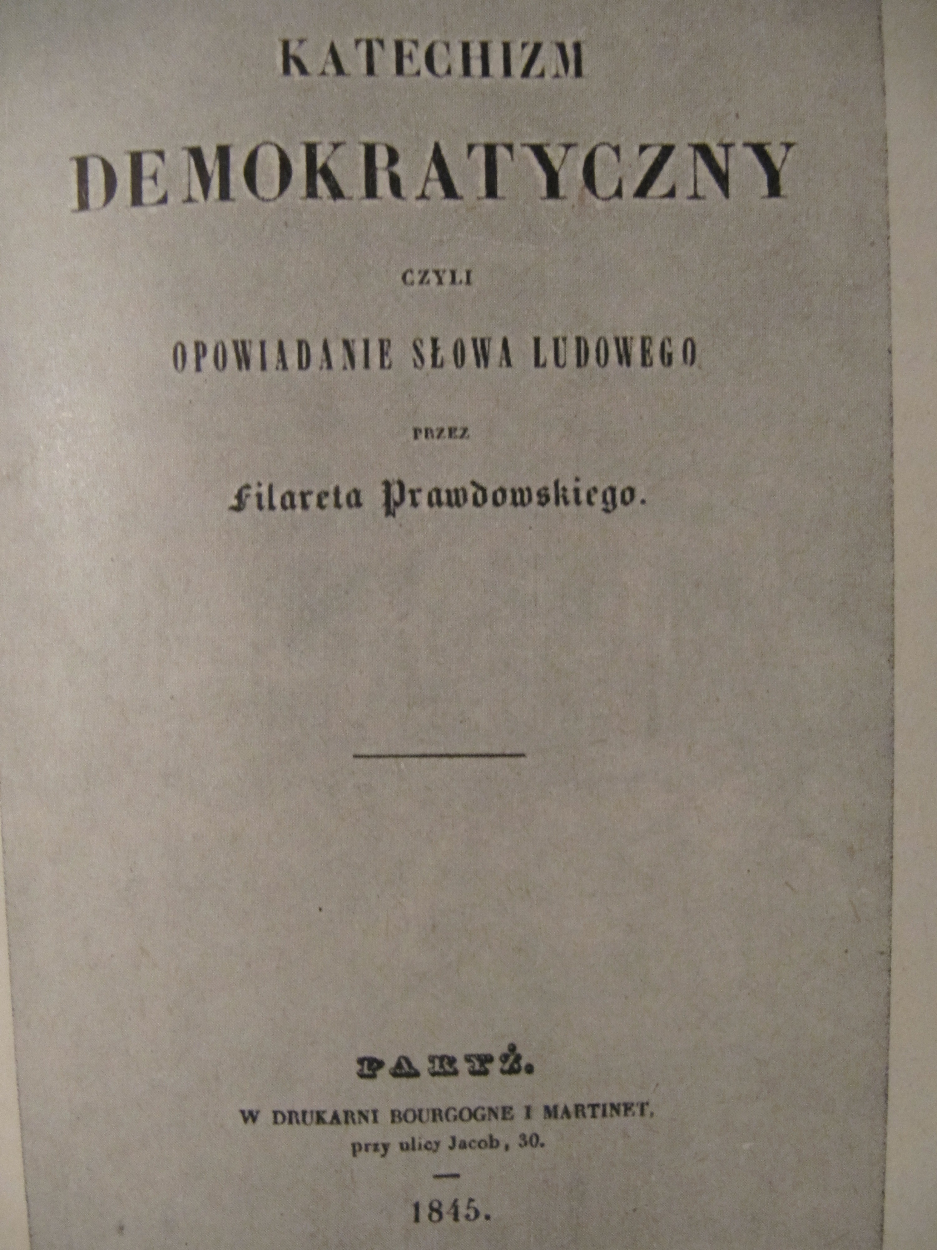 "Katechizm demokratyczny, czyli opowiadania słowa ludowego"